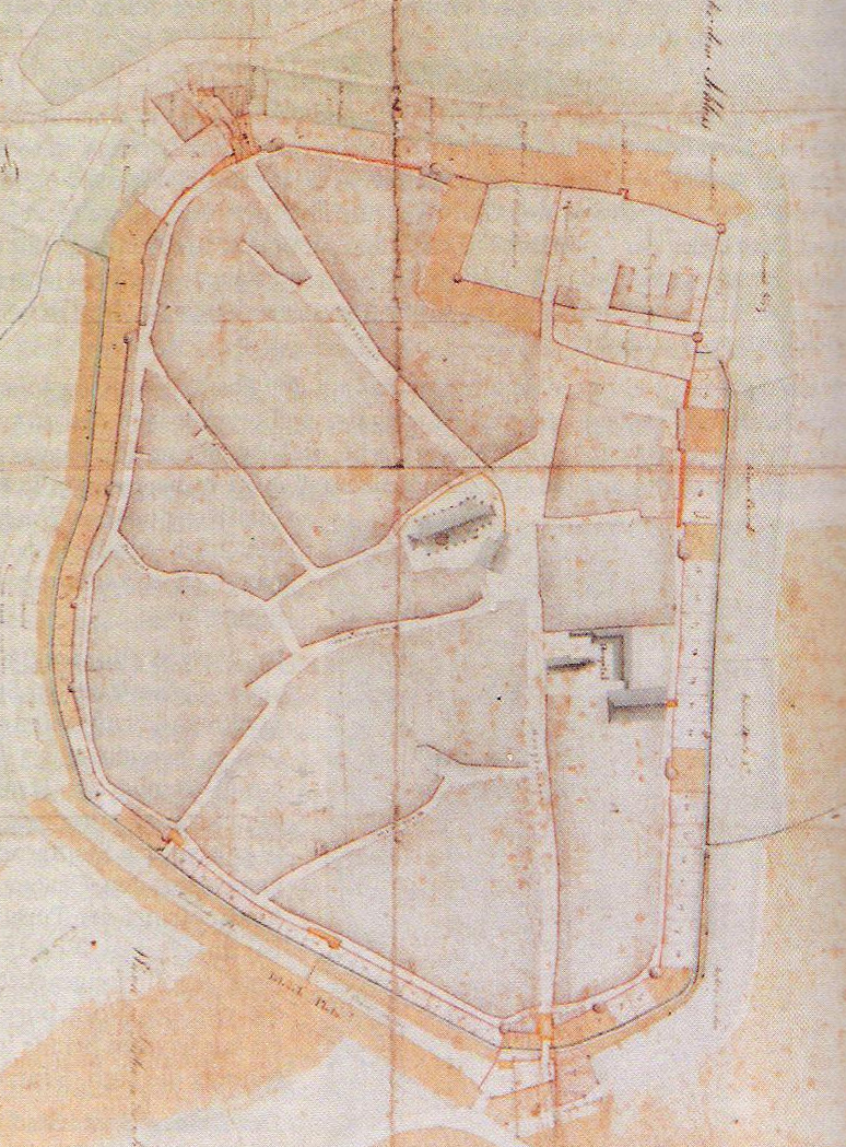 Grundriss der Stadt Deidesheim aus dem Jahr 1818. Grobstruktur des Ortes mit Darstellung des mittlerweile zu großen Teilen abgerissenen Stadtbefestigung